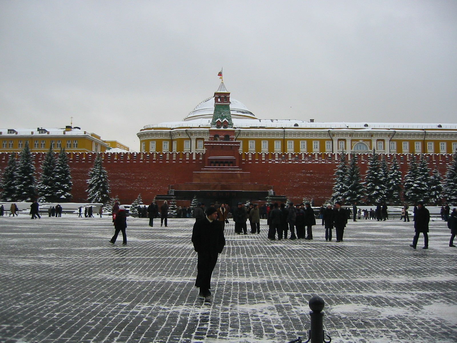 Lenin mausoleum Own work.